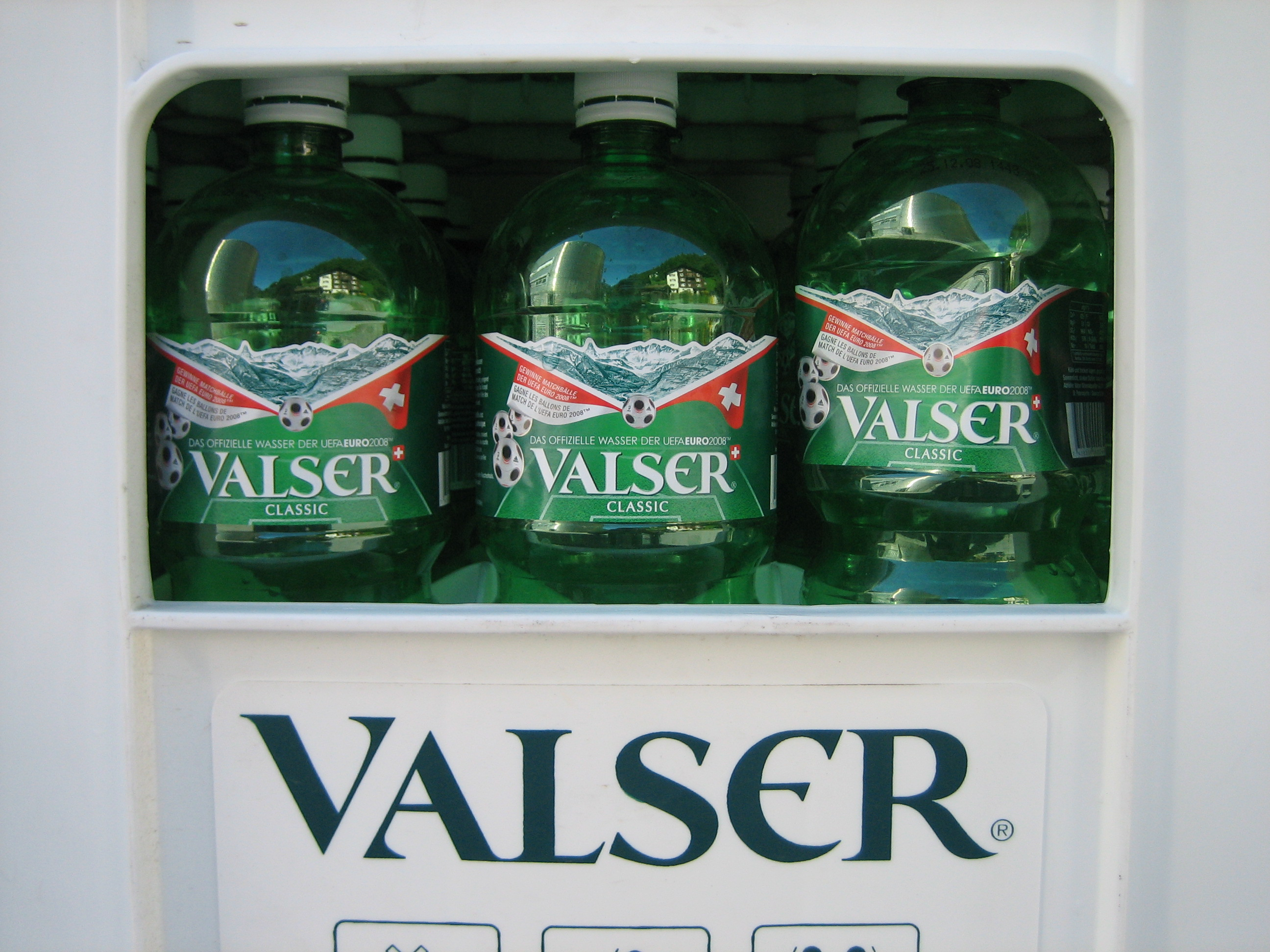 Valserwasser